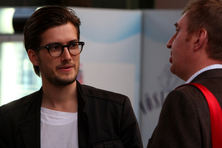 Speakers Dinner; Alexander Ljung (l.), Soundcloud; Marcel Udo, EyeWonder © sebastianmuehlig.de